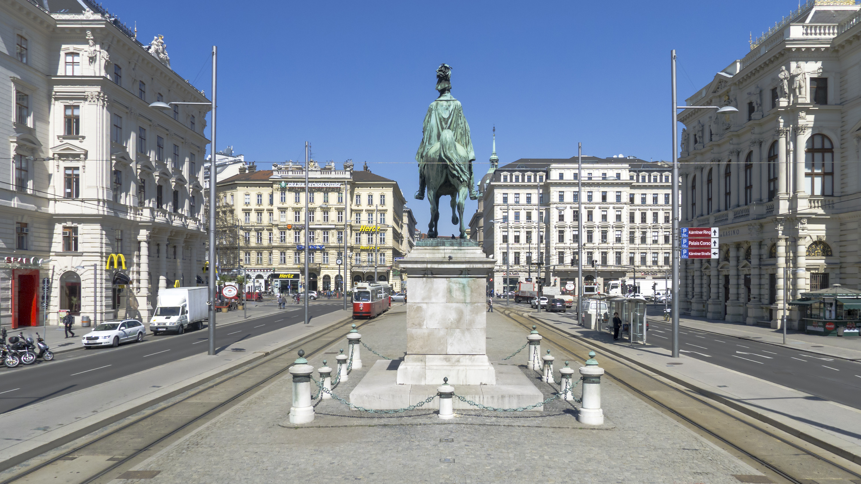 Schwarzenbergplatz in Wien 1 bei Nr. 3 Richtung Norden